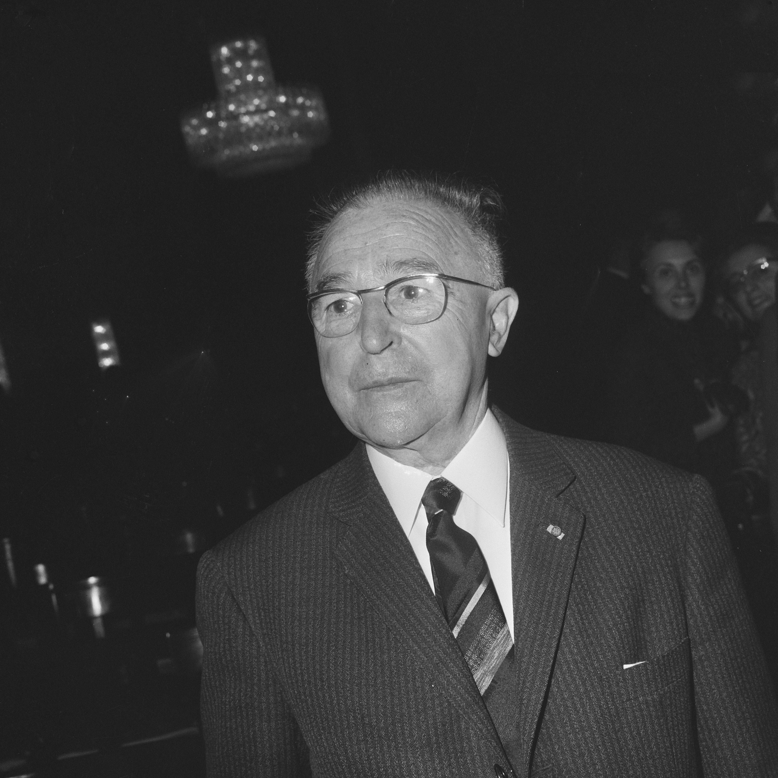 Collectie / Archief : Fotocollectie Anefo Reportage / Serie : Prijs der Nederlandse Letteren voor de Belgische schrijver Gerard Walschap Beschrijving : Portret van Gerard Walschap Datum : 4 oktober 1968 Locatie : Amsterdam, Noord-Holland Trefwoorden : portretten, prijzen, schrijvers Persoonsnaam : Walschap, Gerard Fotograaf : Nijs, Jac. de / Anefo Auteursrechthebbende : Nationaal Archief Materiaalsoort : Negatief (zwart/wit) Nummer archiefinventaris : bekijk toegang 2.24.01.03 Bestanddeelnummer : 921-7395